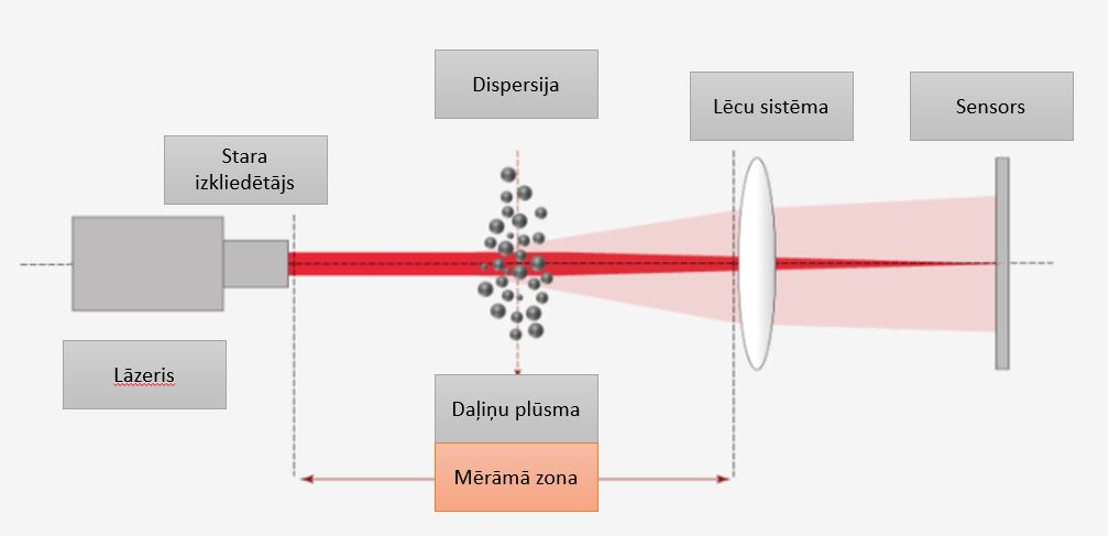 Darbības princips